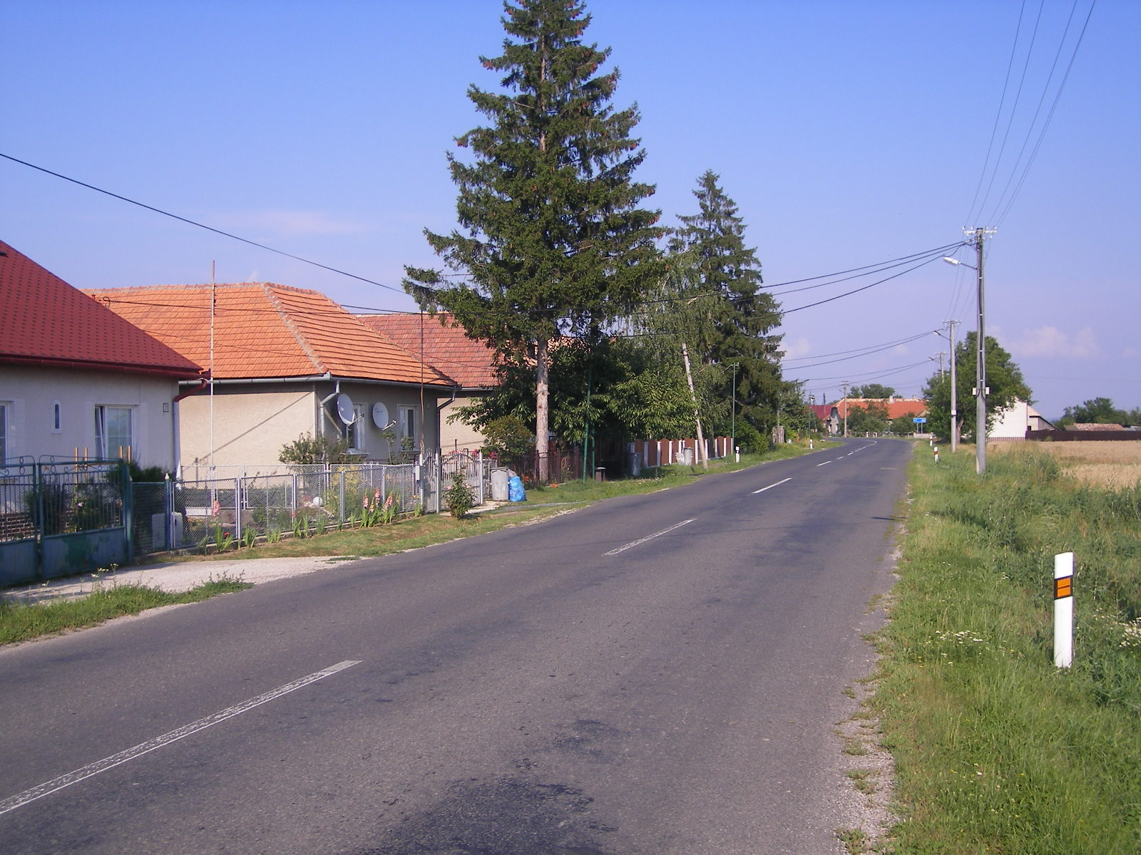 Ipolykeszi - a 527-es út a falu nyugati szélénél